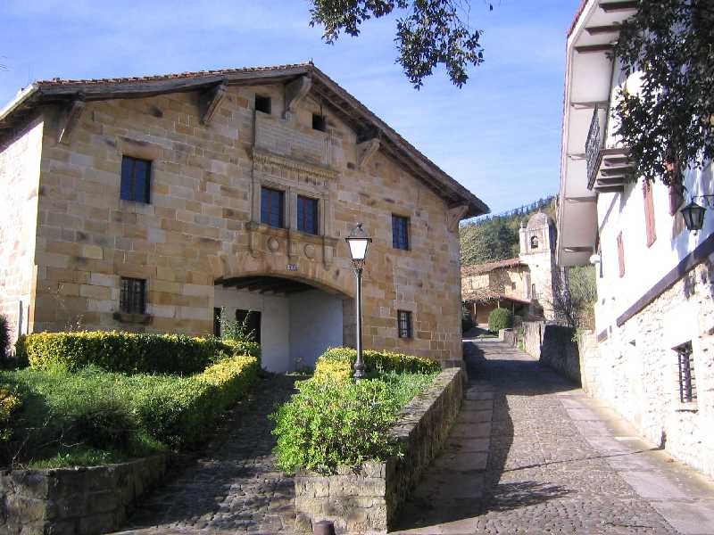 Rincón de Garai, Vizcaya, País Vaco, España.